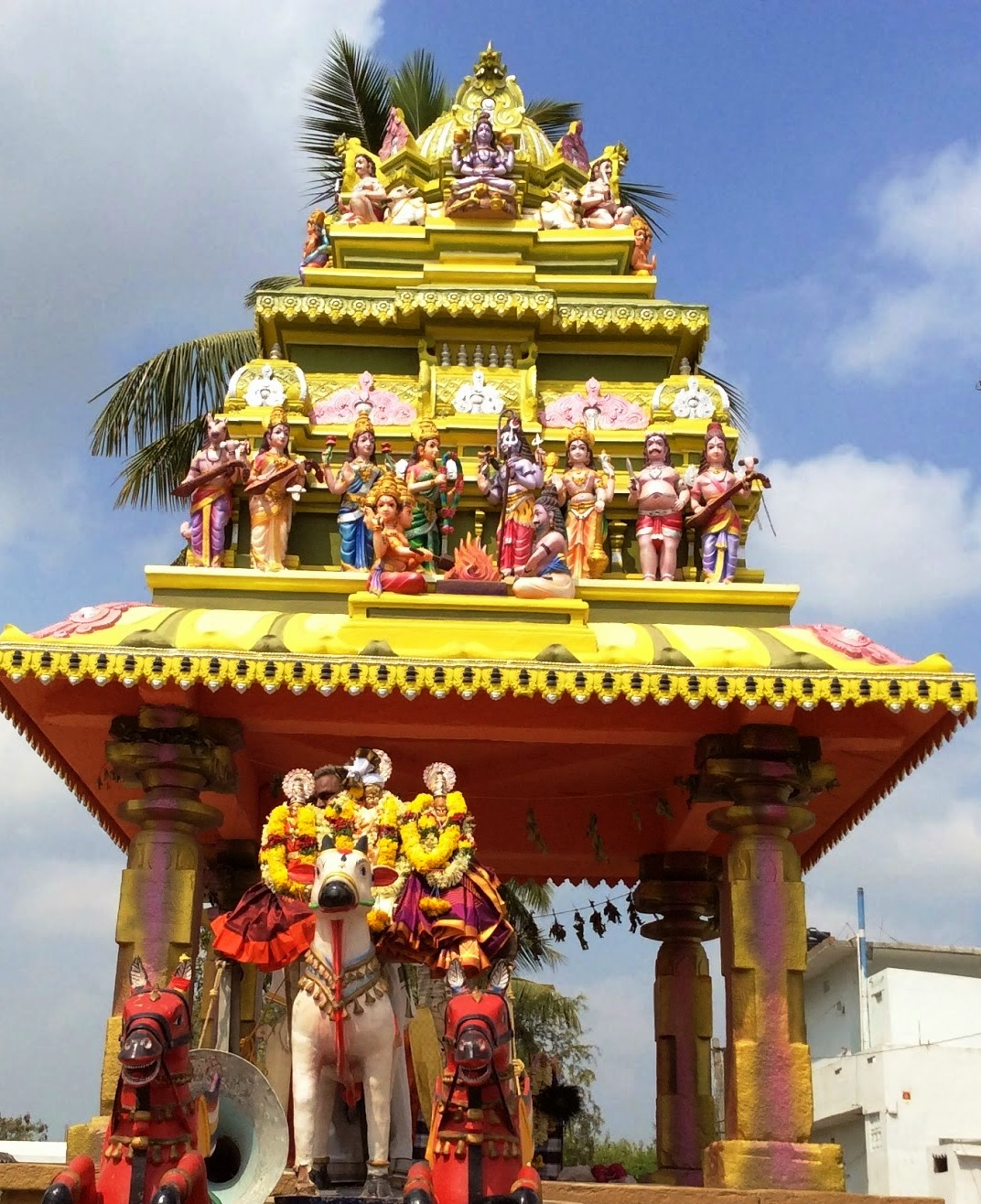 కళ్యాణ మండపం